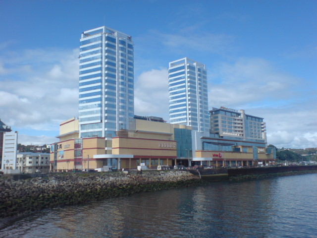 Fotografía del Mall paseo Costanera, desde el muelle.